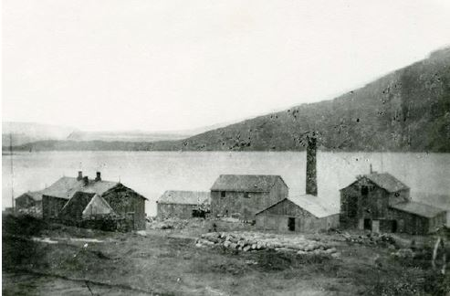 Uppsalaeyri við aldamótin 1900.